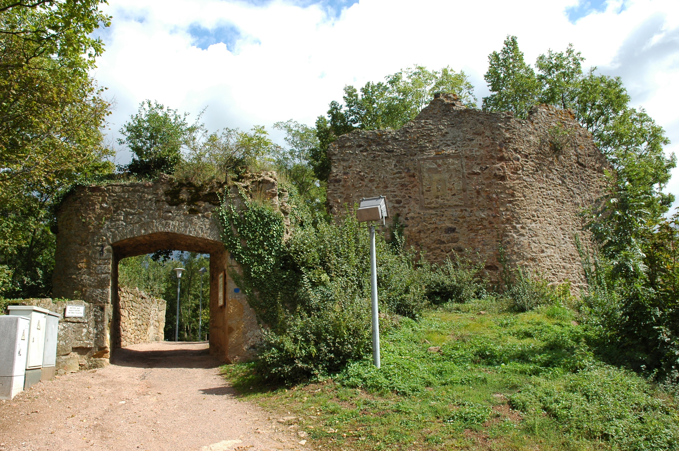 Das innere Tor der Landsburg bei Obermoschel